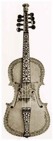 Fele bygget av Gunnar Gunnarsson Helland (1889-1976). Brosjyre fra Helland Brothers (1905-1927).